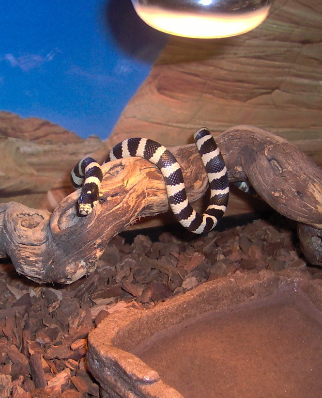 Lampropeltis Getulus Californae